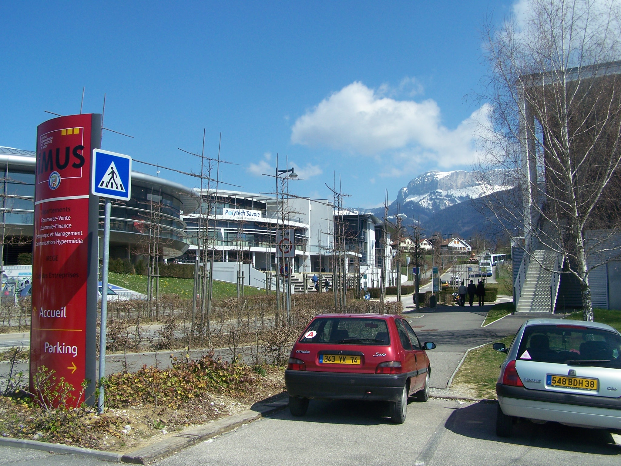 Université de Savoie campus on Annecy-le-Vieux, Haute-Savoie, France. Can be seen Polytech Savoie and Institut de Management de l'Université de Savoie institutes.